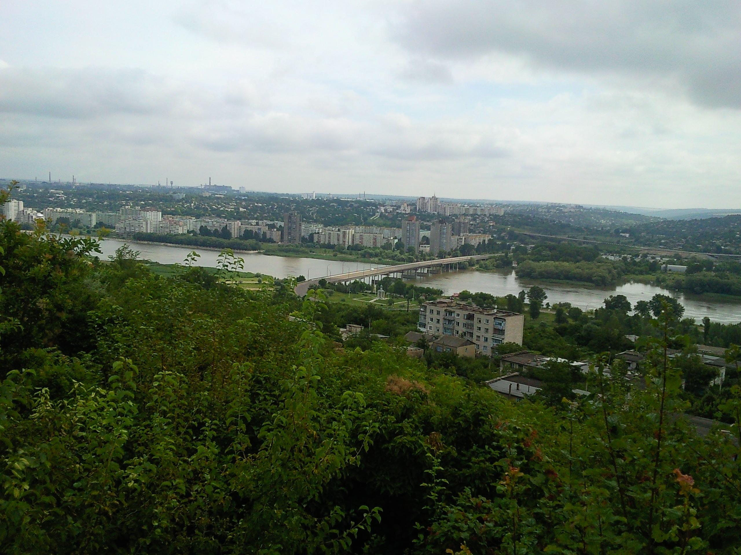 Рыбница со стороны Резины